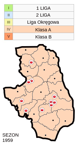 Jagiellonia w sezonie 1959 - mapa klubów